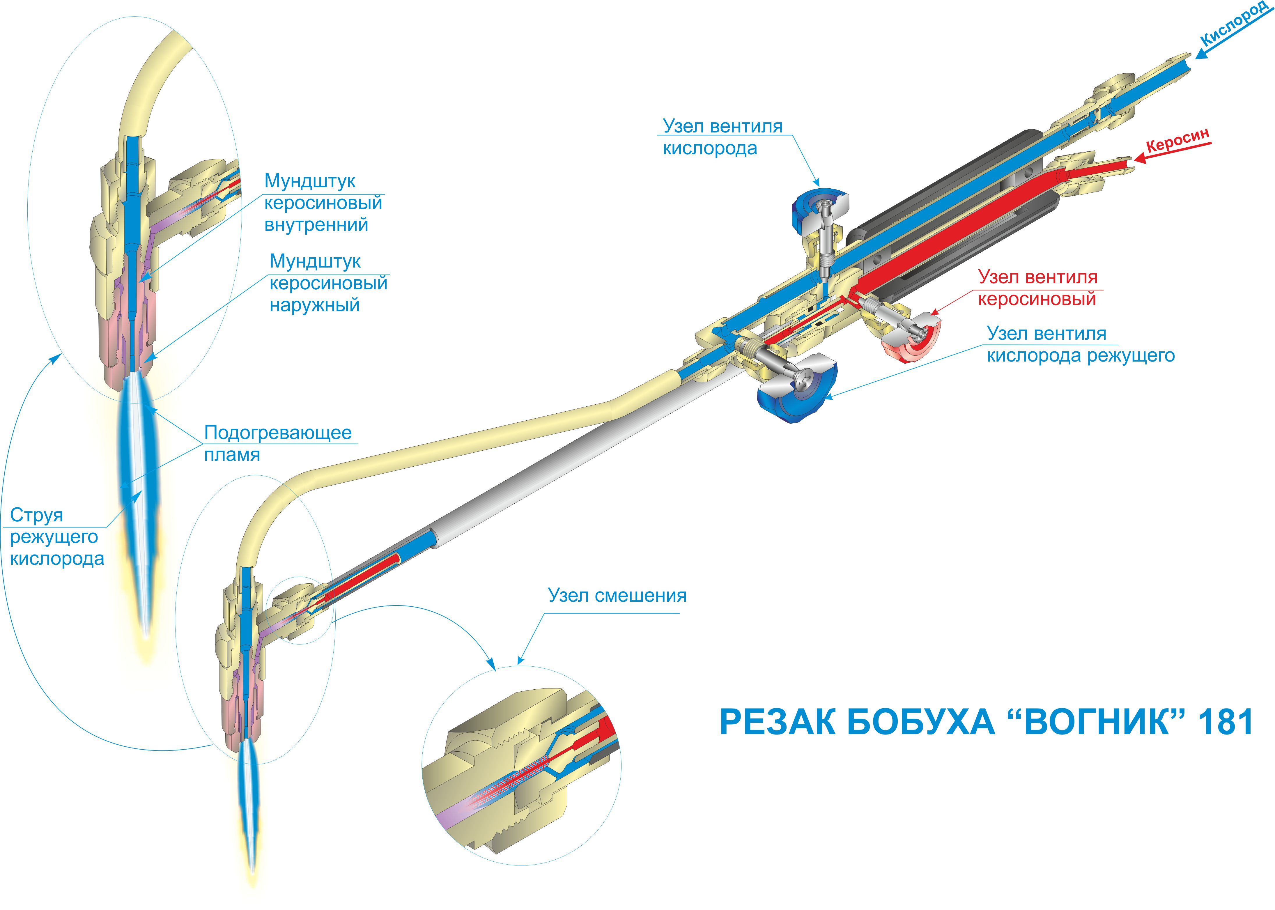 Резак жидкотопливный (керосинорез) с механическим распылением топлива. Резак Бобуха "Вогник" 181.